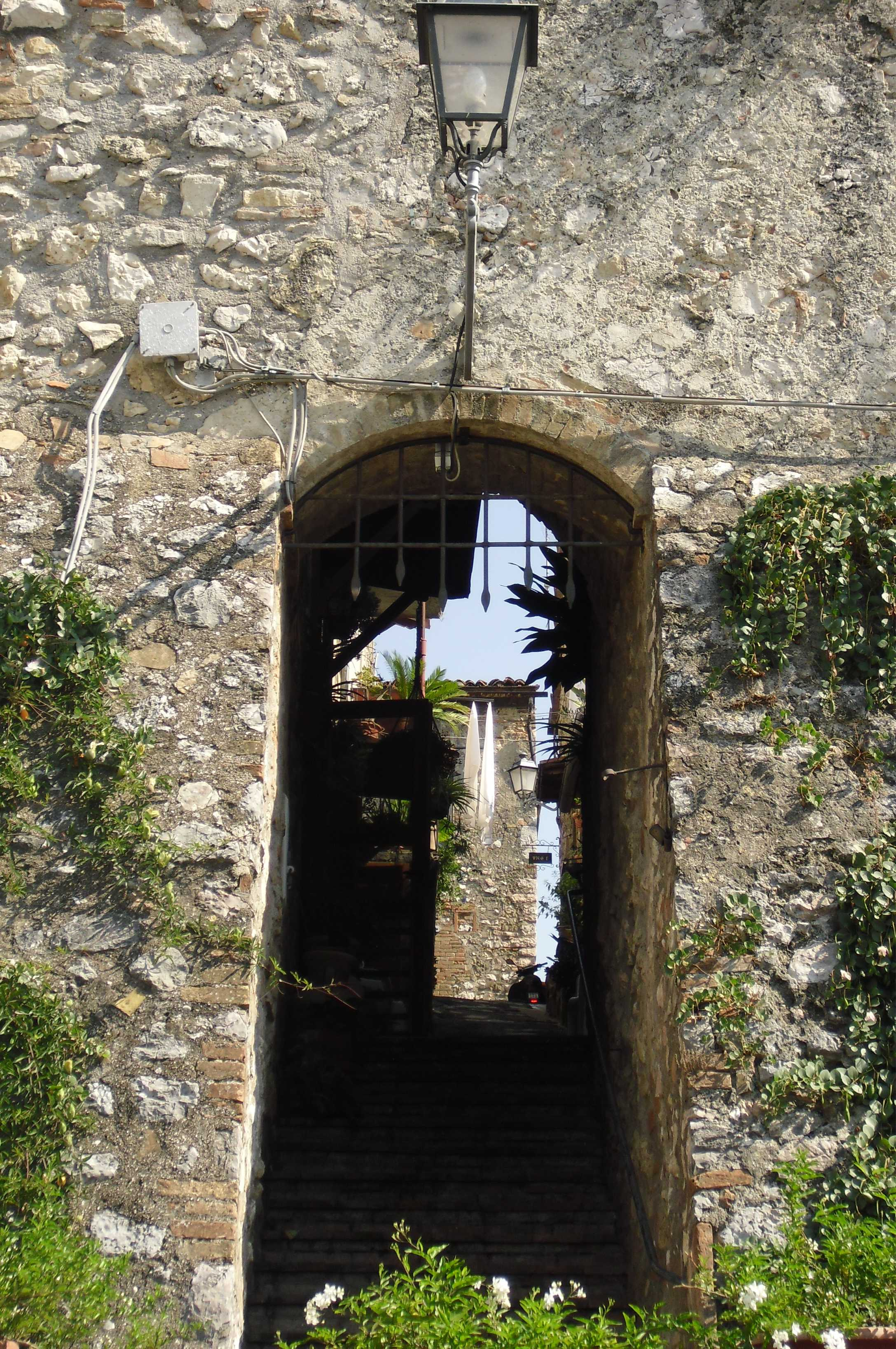 uno dei vicoli